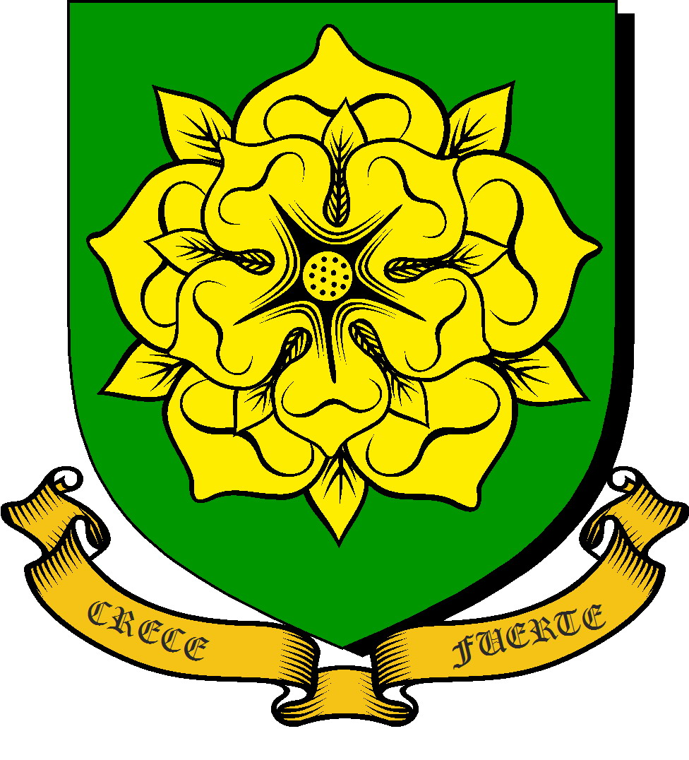 escudo libre en base a el libro cancion de hielo y fuego